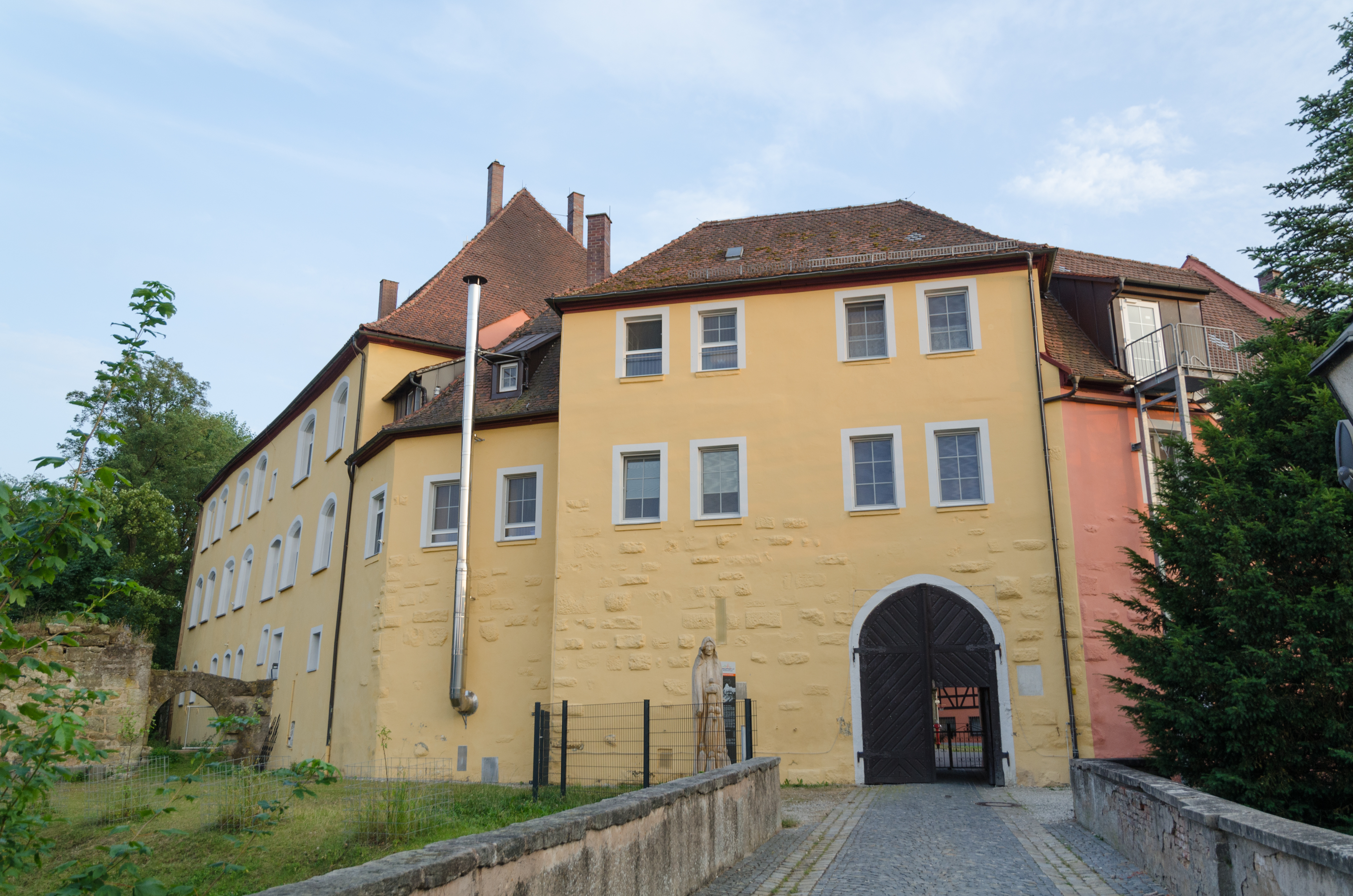 Wassertrüdingen, Marktstraße 39